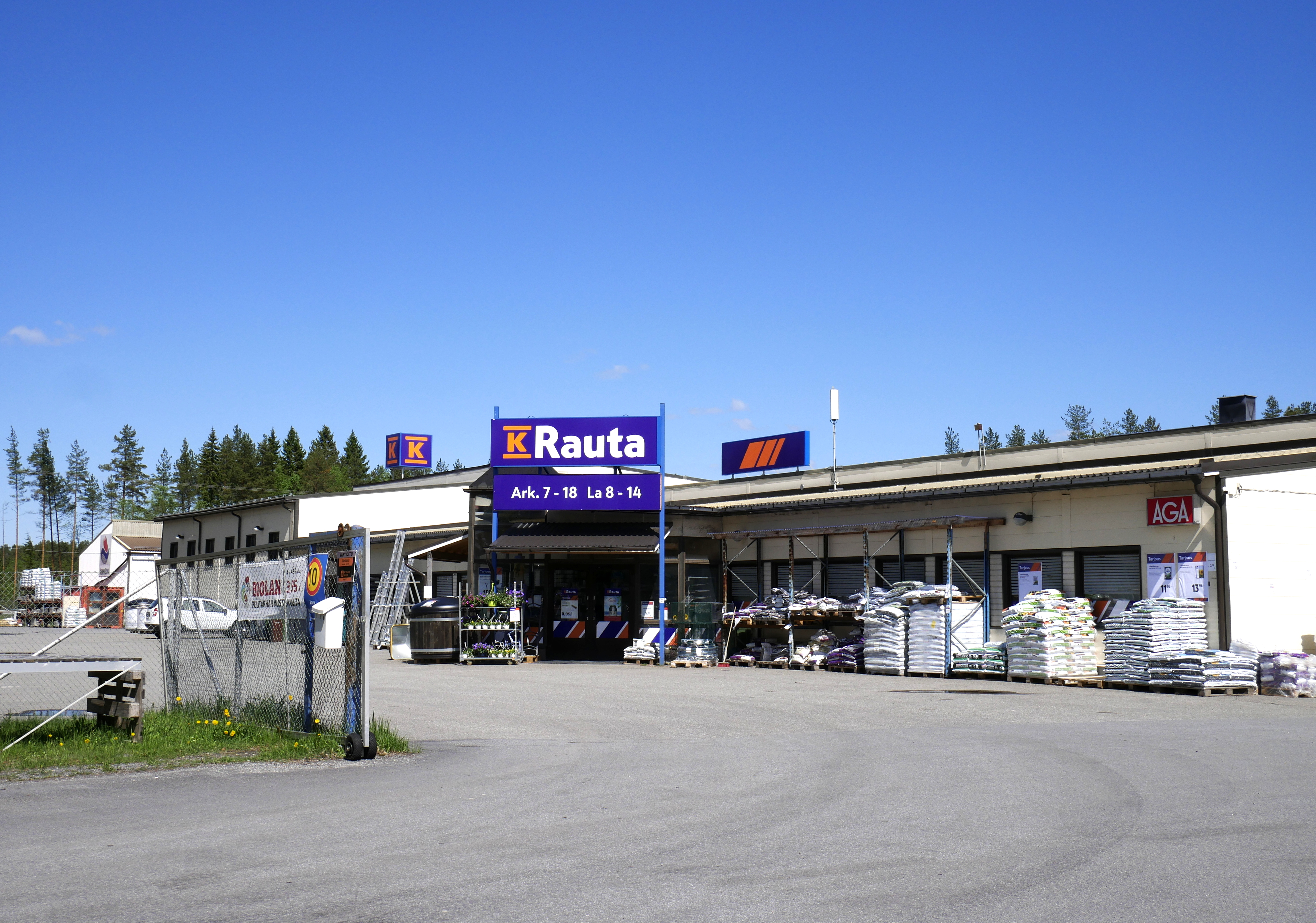 Alajärven K-Rauta.